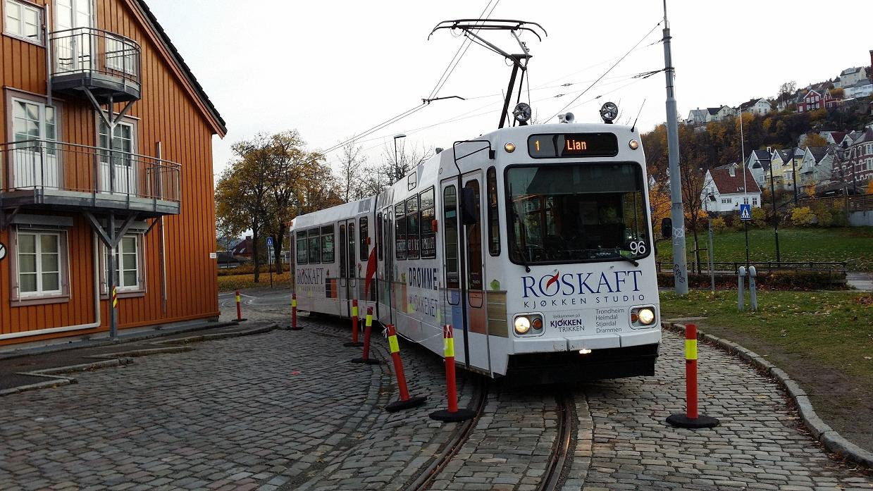 Vogn 96 snur i sidesporet på Ila mens de bytter skinner i St. Olavsgate-sløyffa i sentrum.